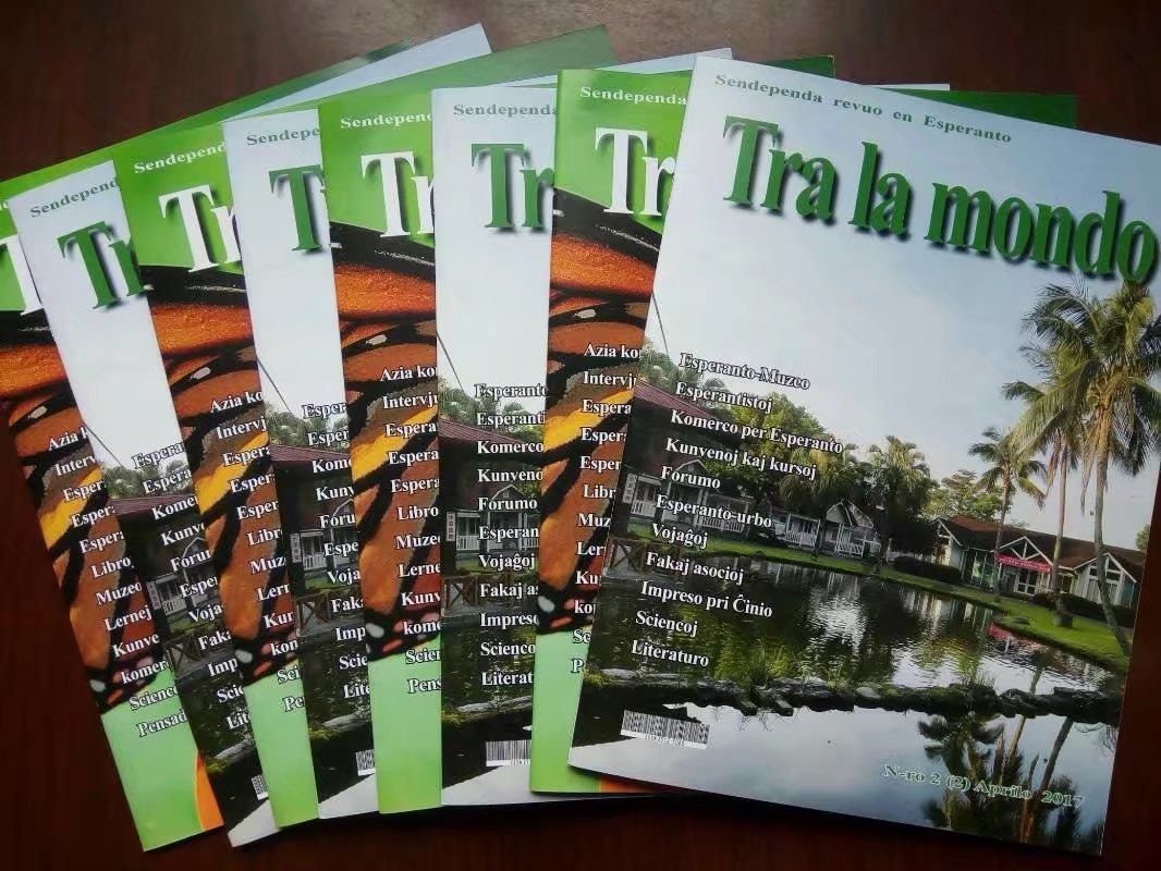 foto de la revuo Tra la mondo